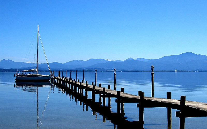 Chiemsee - Bayern - Deutschland